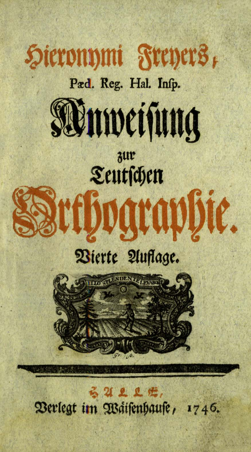 Hieronymus Freyer: Anweisung zur Teutschen Orthographie. Halle 1746.